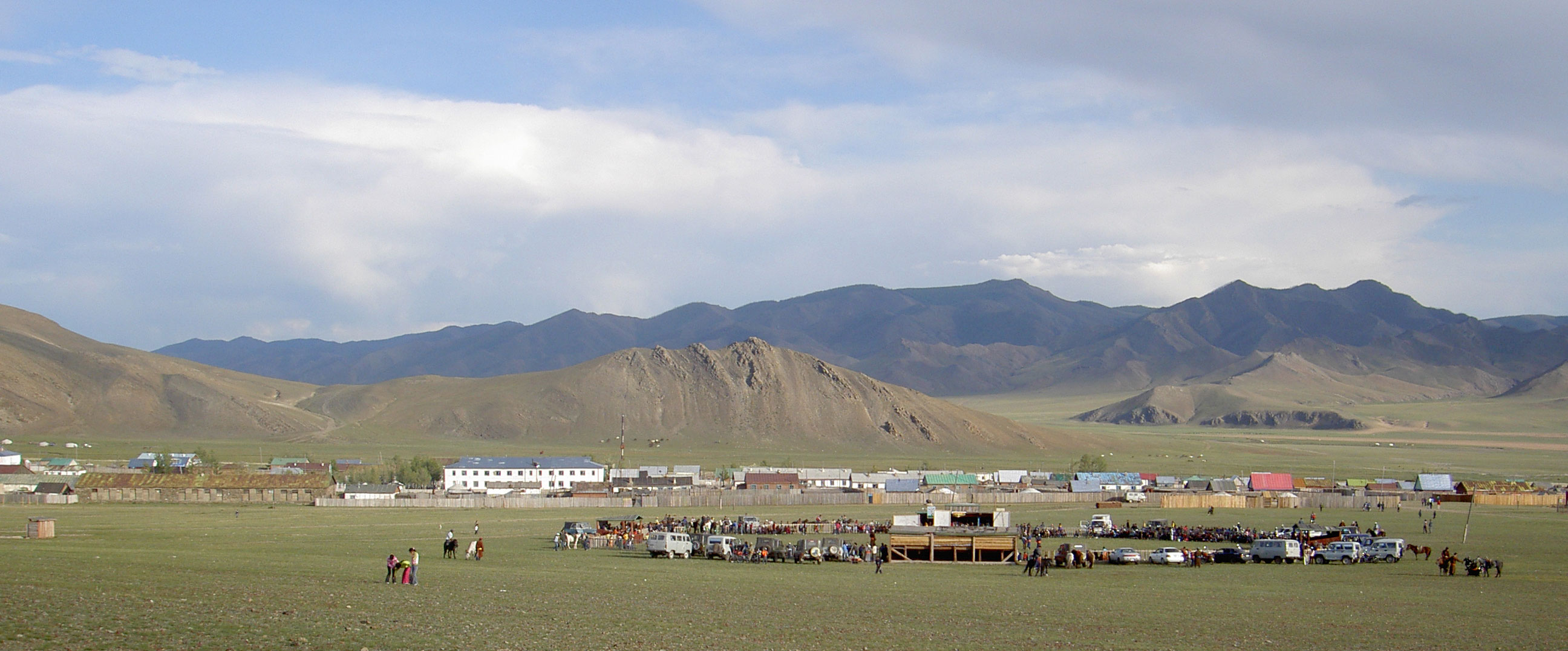 Small Naadam in Tömörbulag sum, Khövsgöl, Mongolia